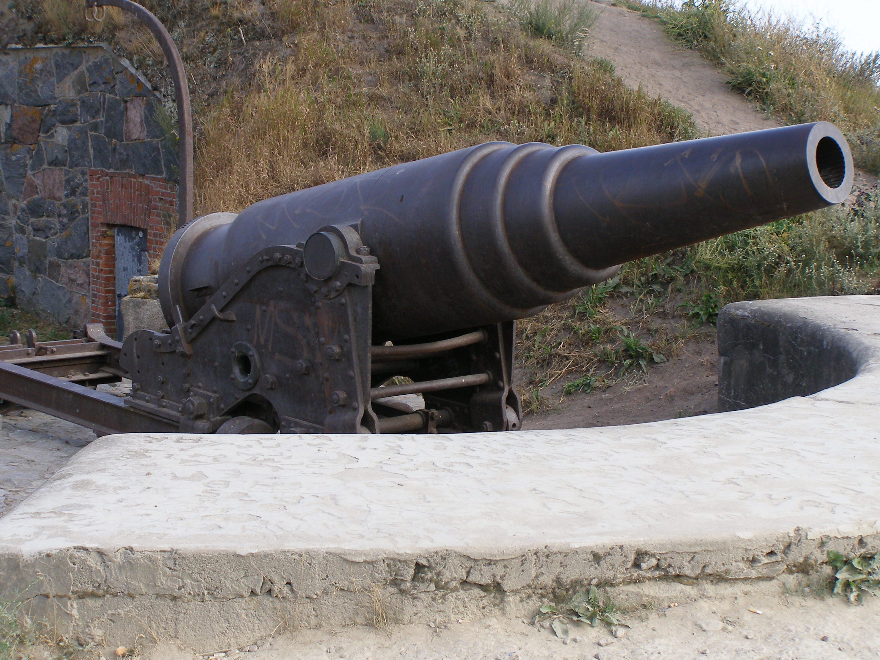 Suomenlinna Fortress/Festung/pevnost, Helsinki